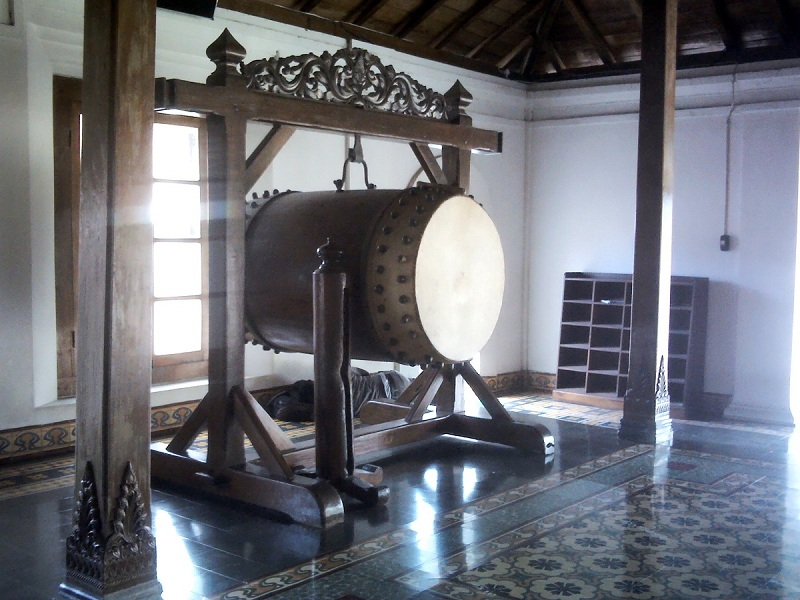 Banyumas